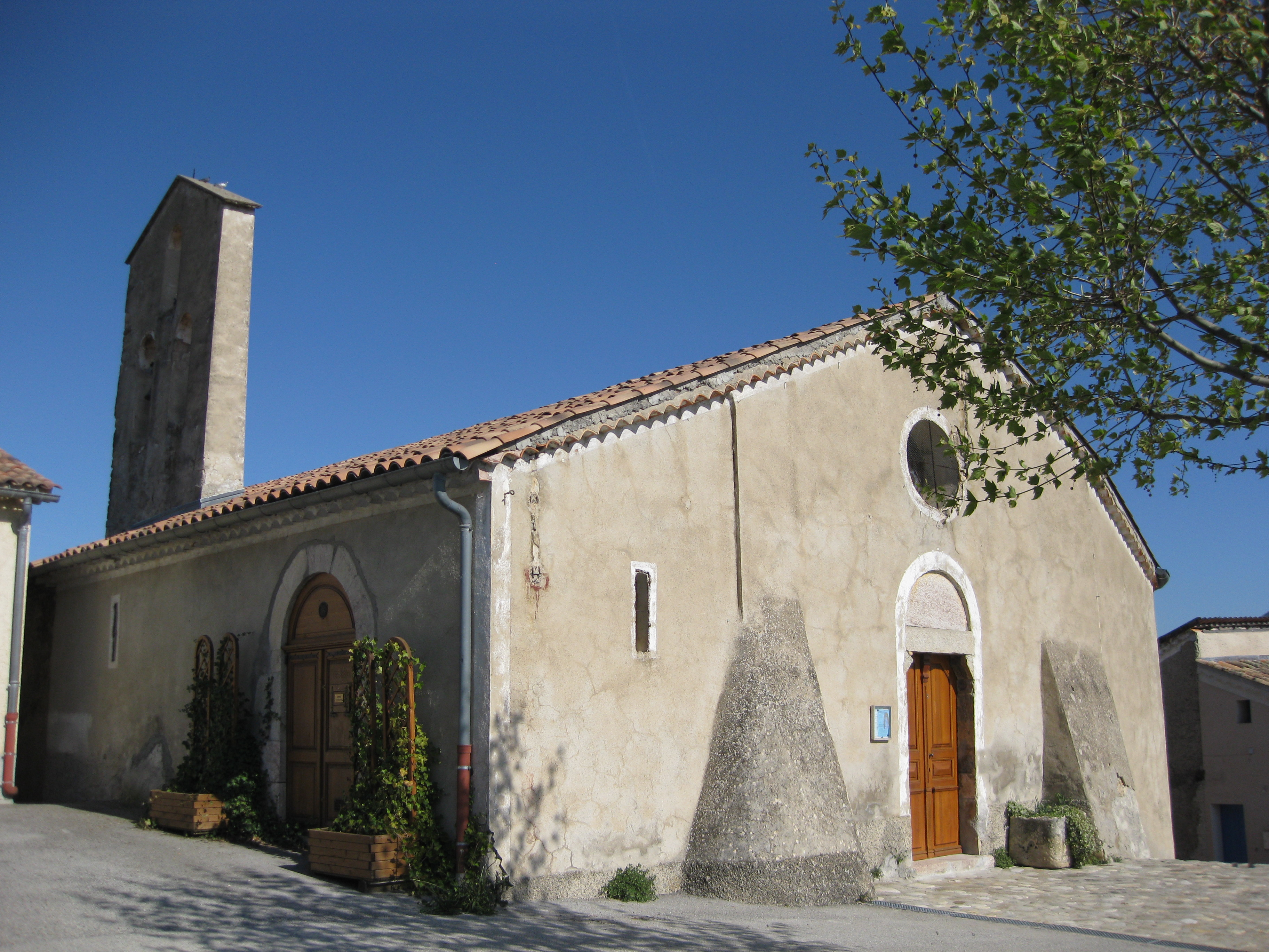 Eglise du village de Sigoyer (Alpes de Haute-Provence)